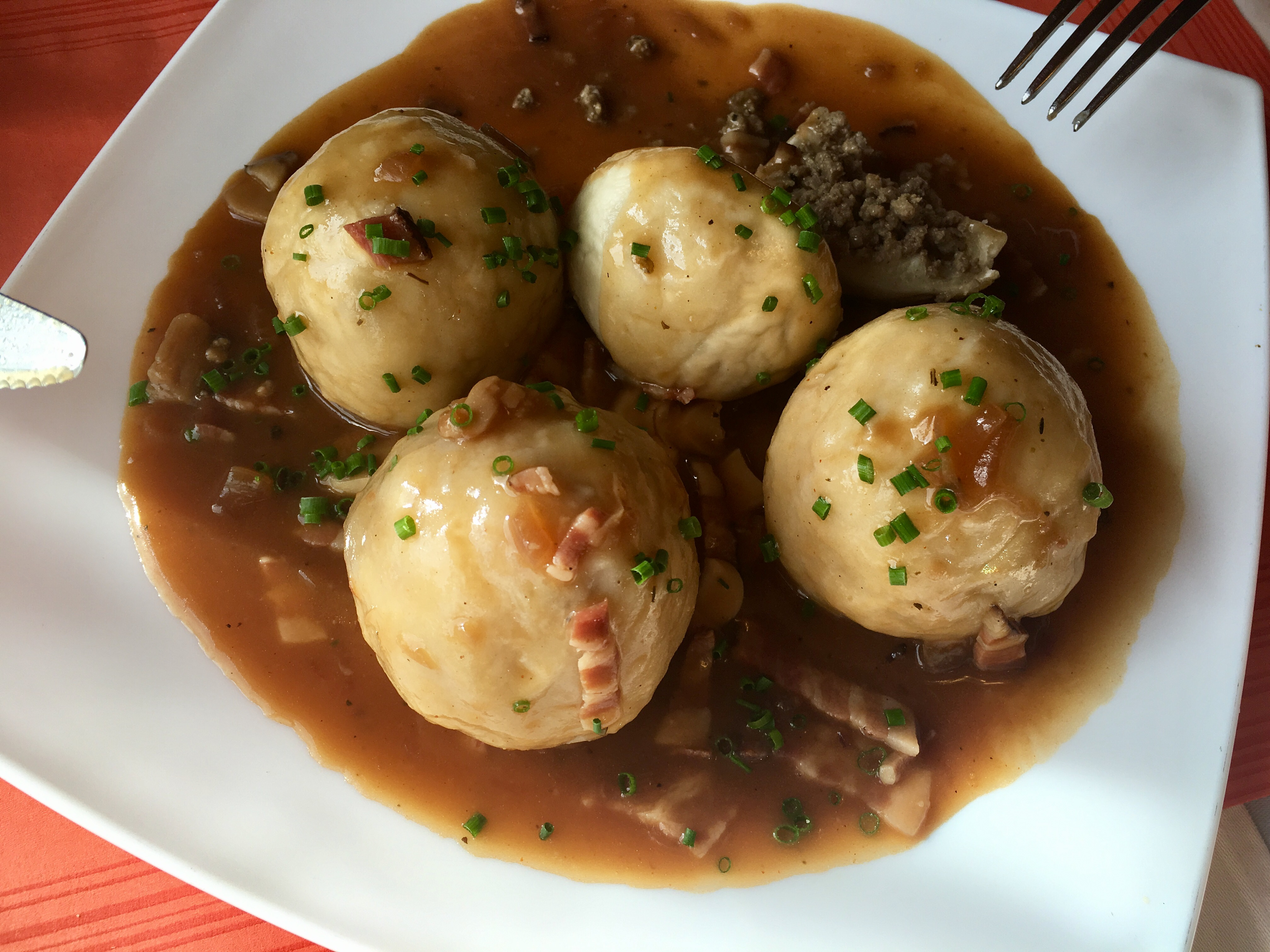 Speckknödeln